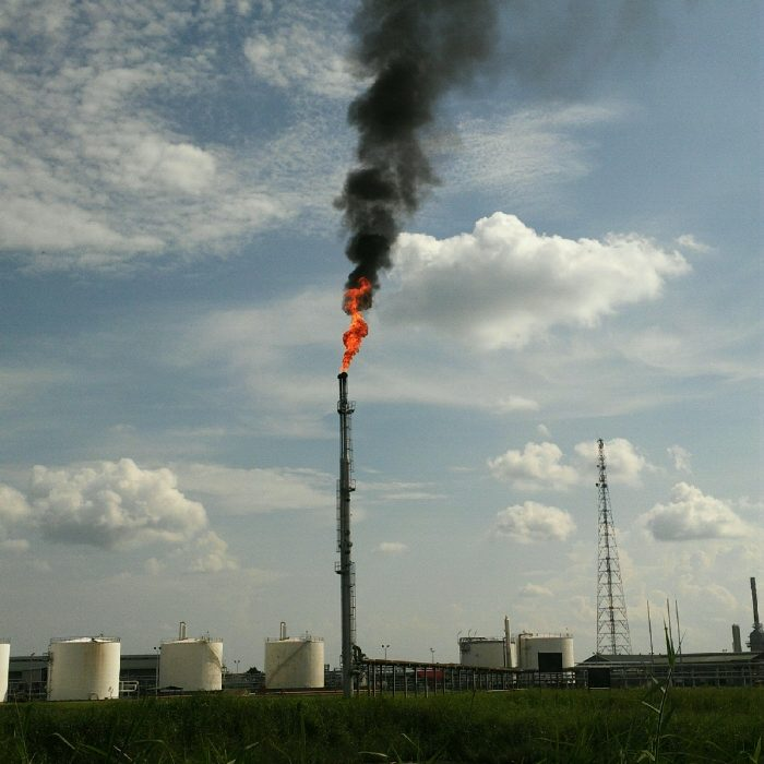 lokasi petro china geragai jambi